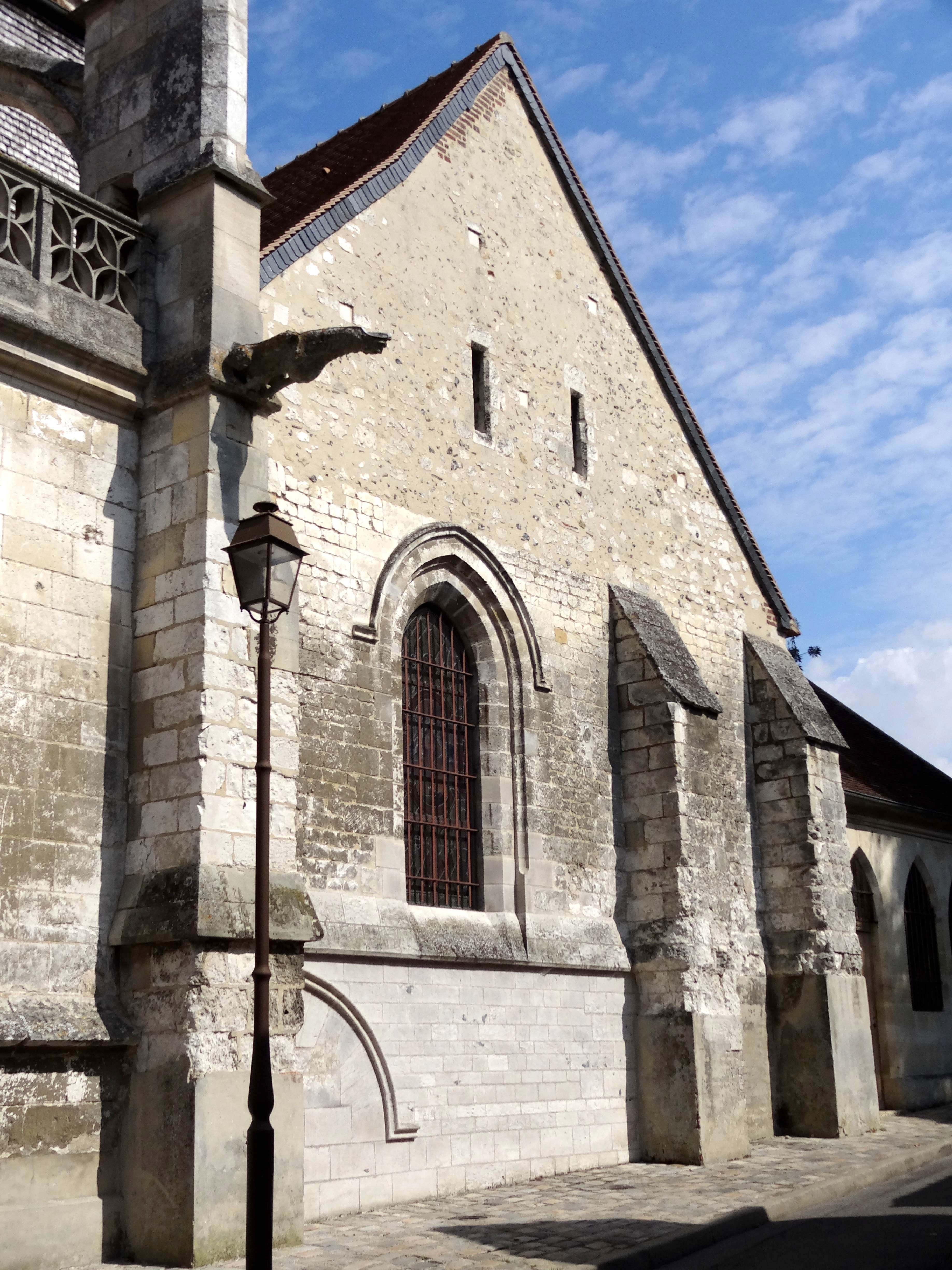 Église Notre-Dame de Marissel - voir titre.